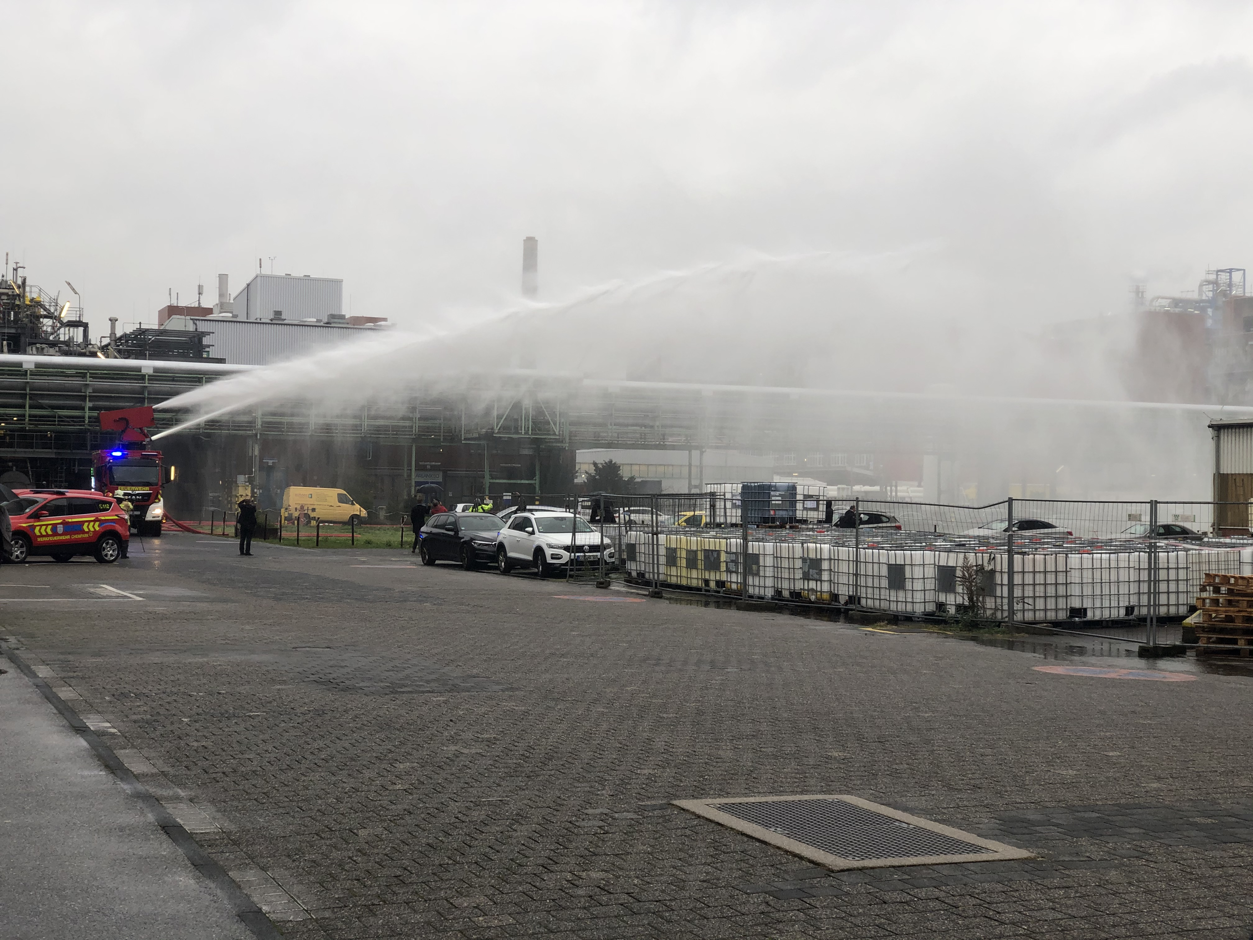 Bild des Turbinenlöschfahrzeugs (TULF) des Chempark Leverkusen bei der Wasserabgabe